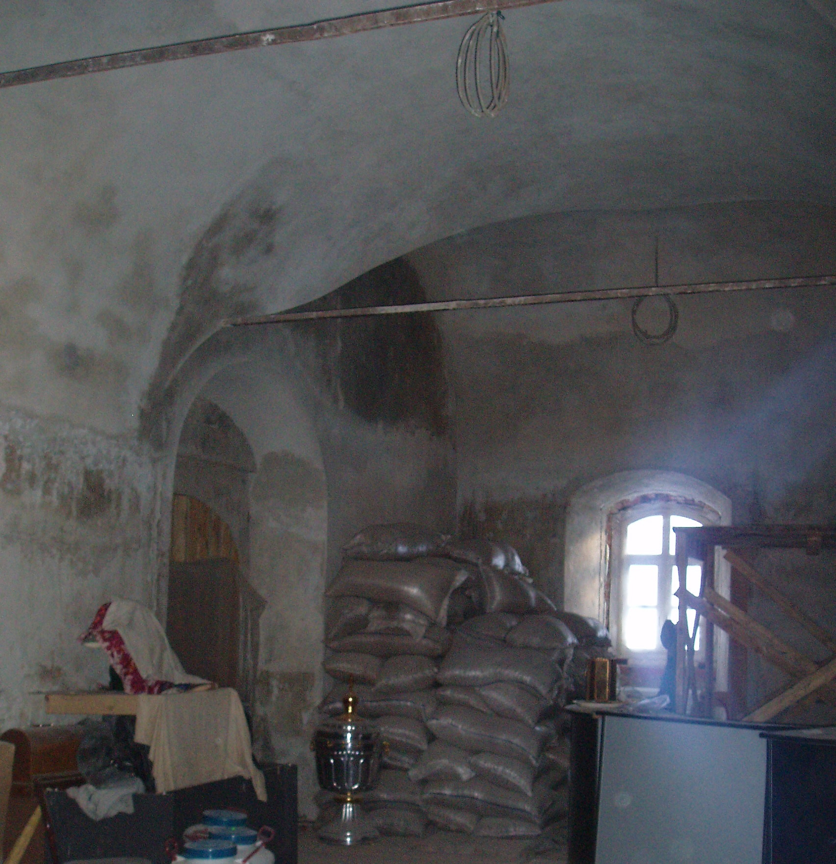 Отделочные работы в притворе Успенской церкви Амвросиева Николаевского Дудина монастырь